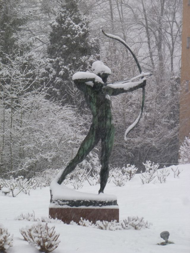 Schloss Mönchstein-Schütze